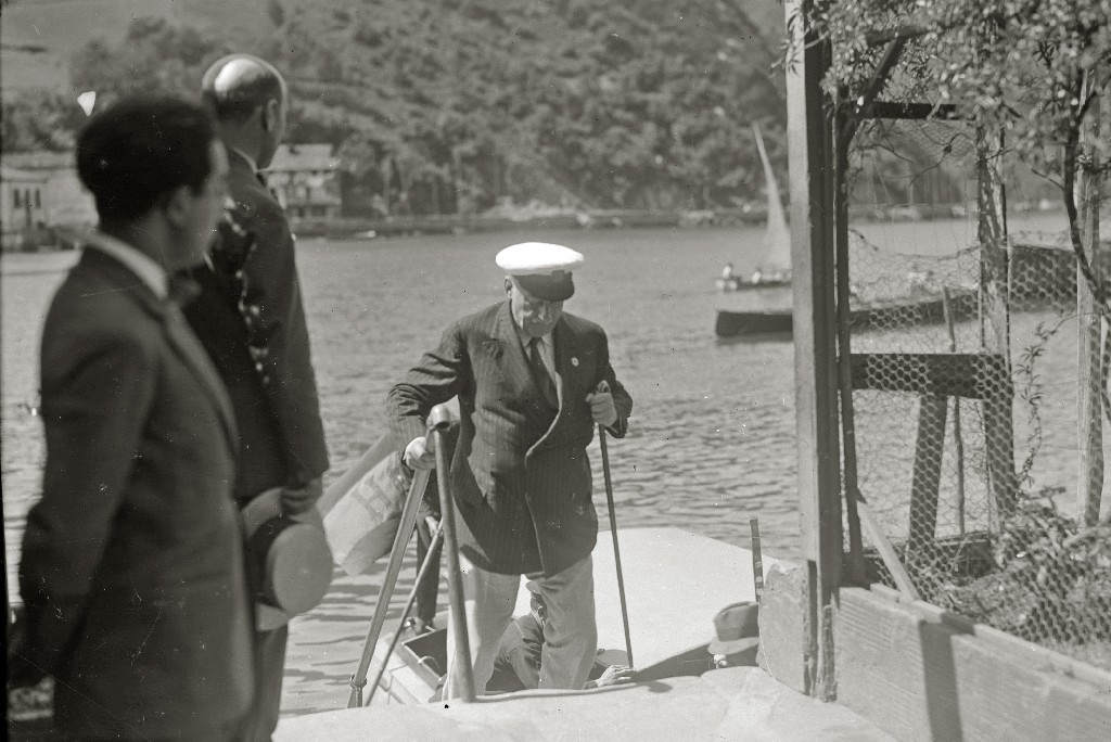 Título original: Visita del general Miguel Primo de Rivera a la localidad de Pasai Donibane (5/6) Localización: Pasajes (Guipúzcoa)